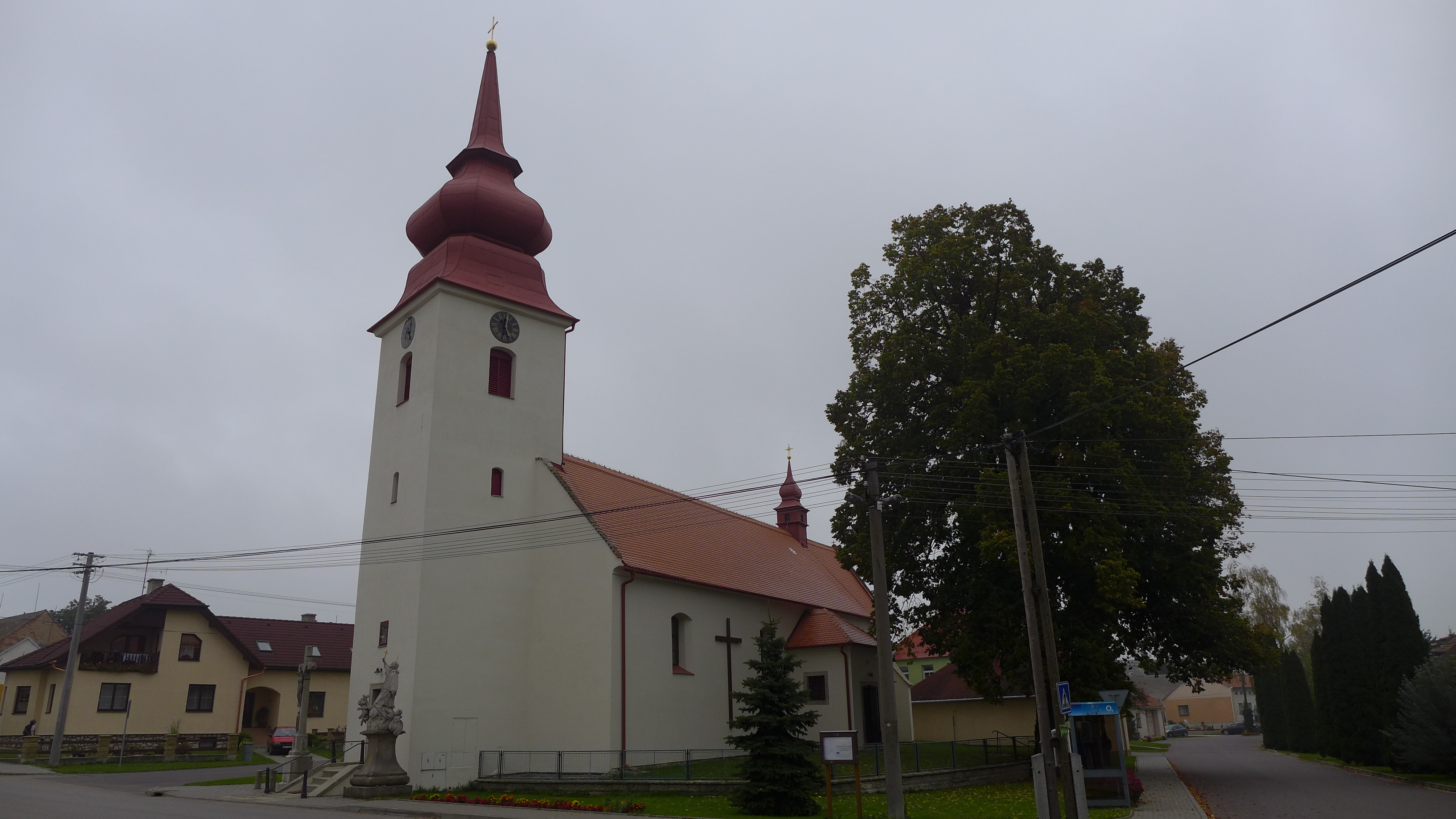 Kostel svatého Prokopa, v obci, Domamil.